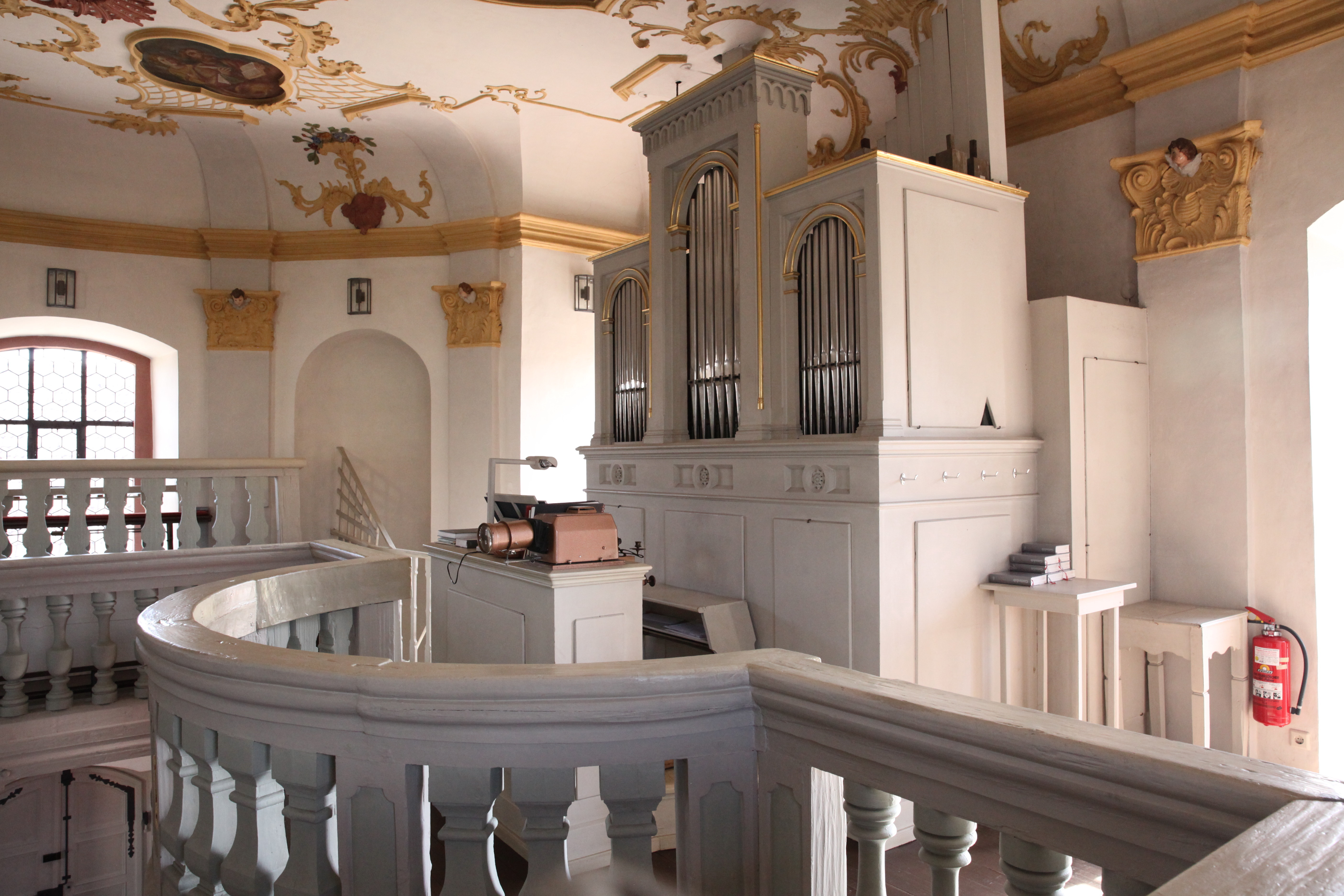 St. Laurentius in Lettenreuth